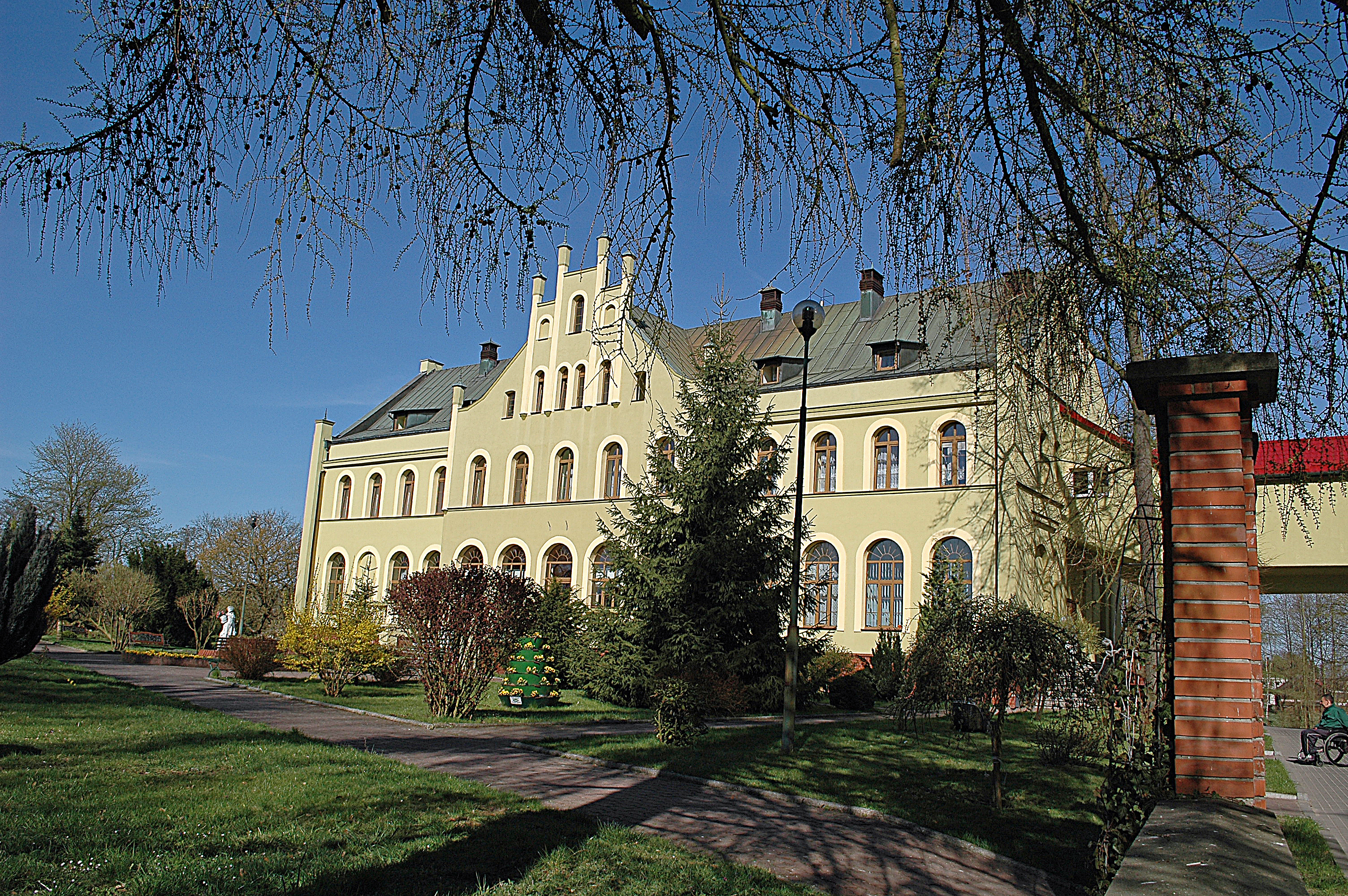 Czarne, ruina zamku, 1395-1403